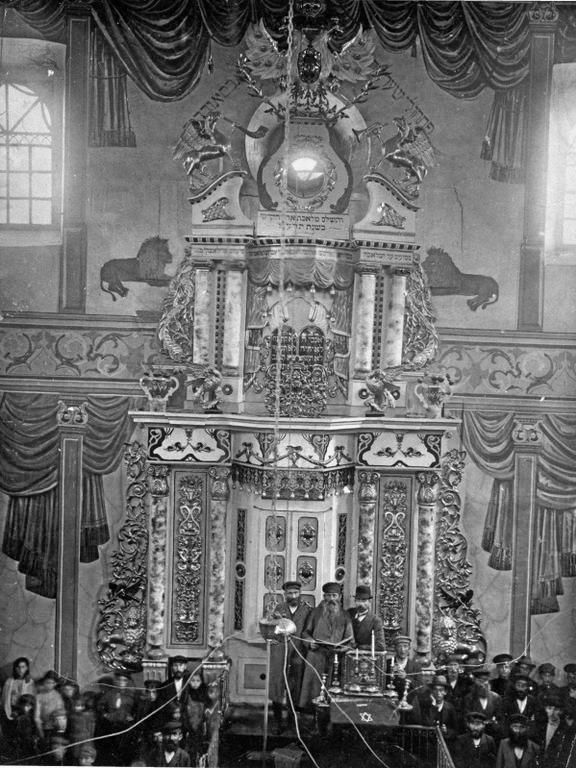 Паволочь, интерьер синагоги.